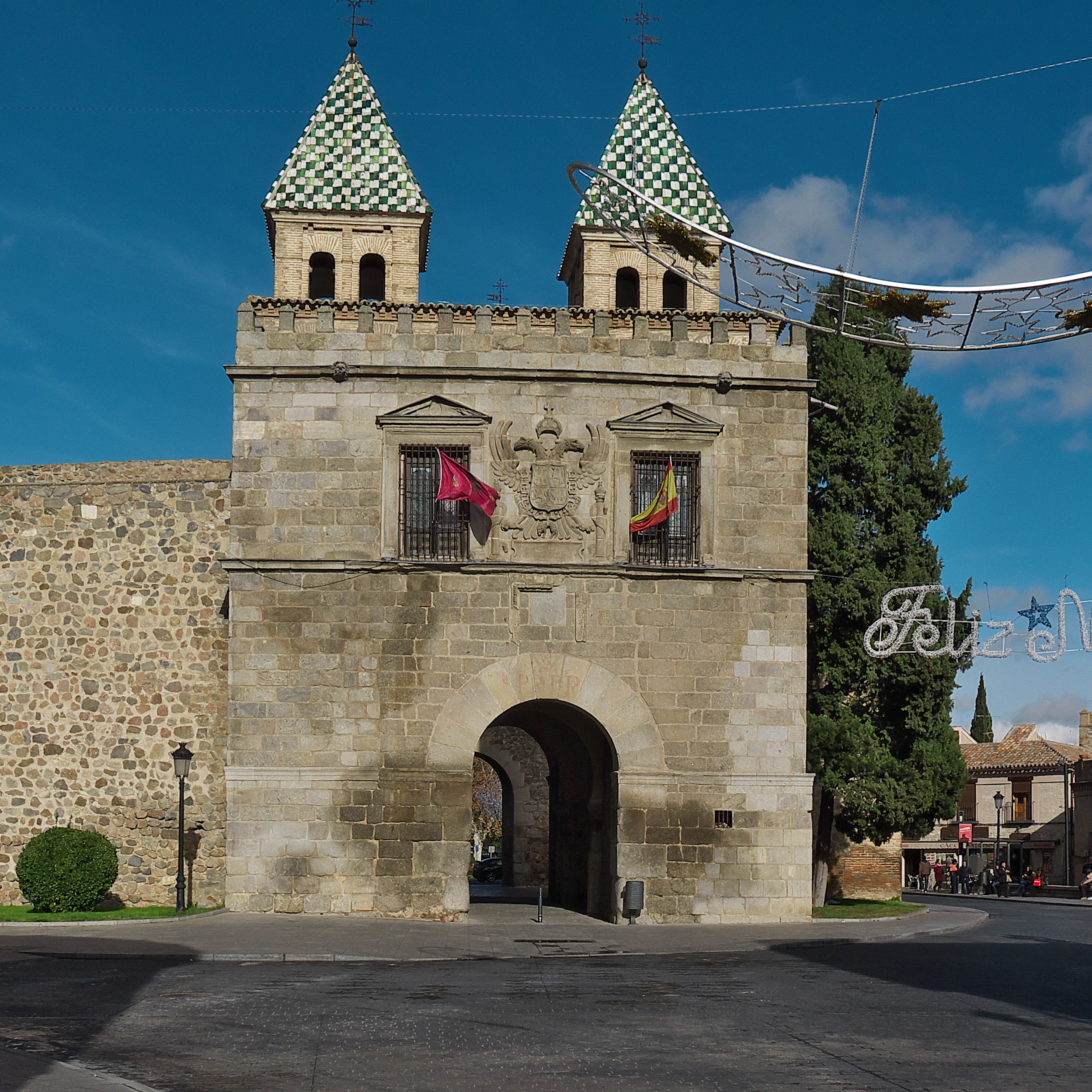 Reconstruída en tiempos de Carlos I (1550-1576) iniciada por Alonso de Covarrubias y terminada por Nicolás Vergara el Mozo